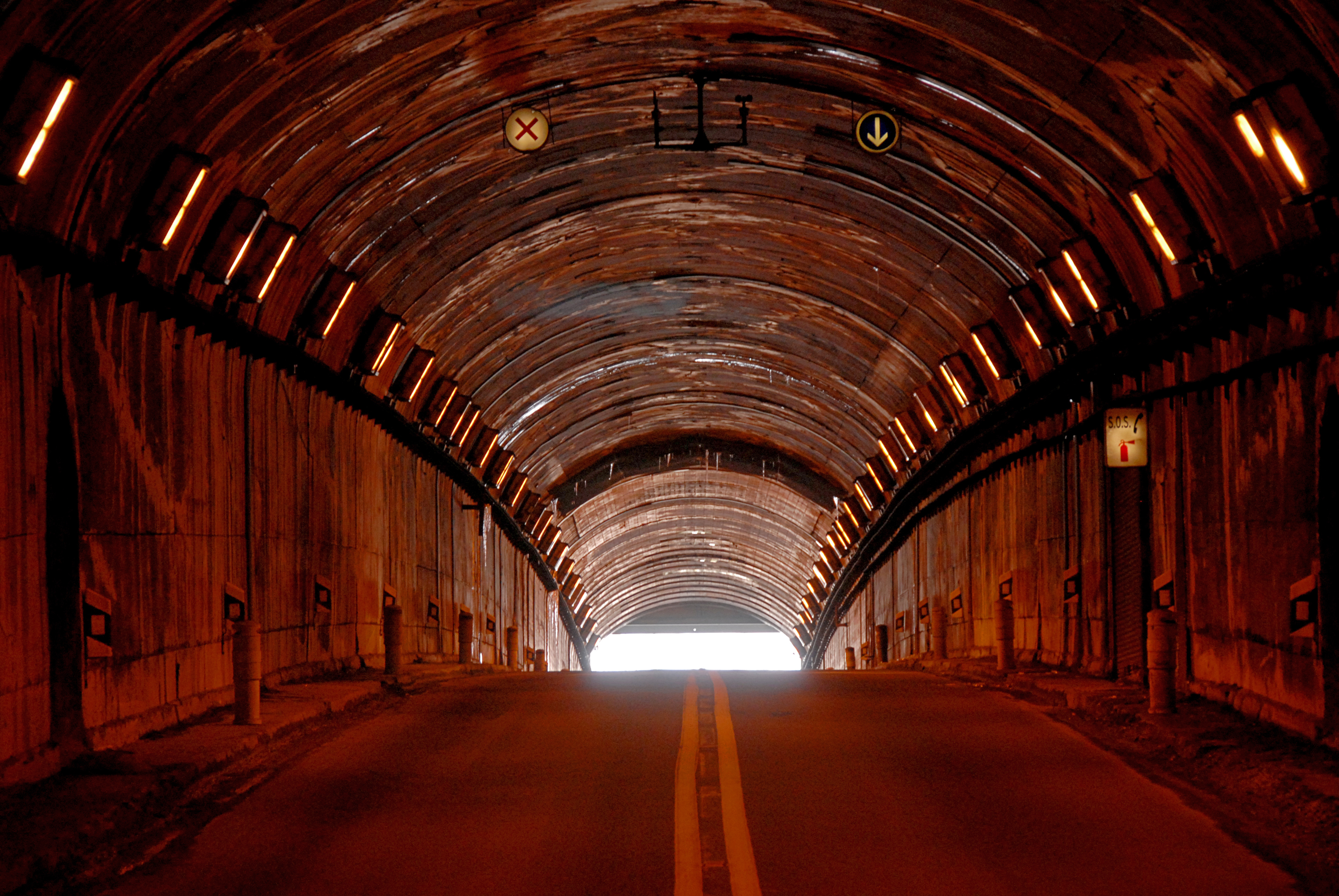 FINAL DEL TUNEL EN LA PARTE FRANCESA